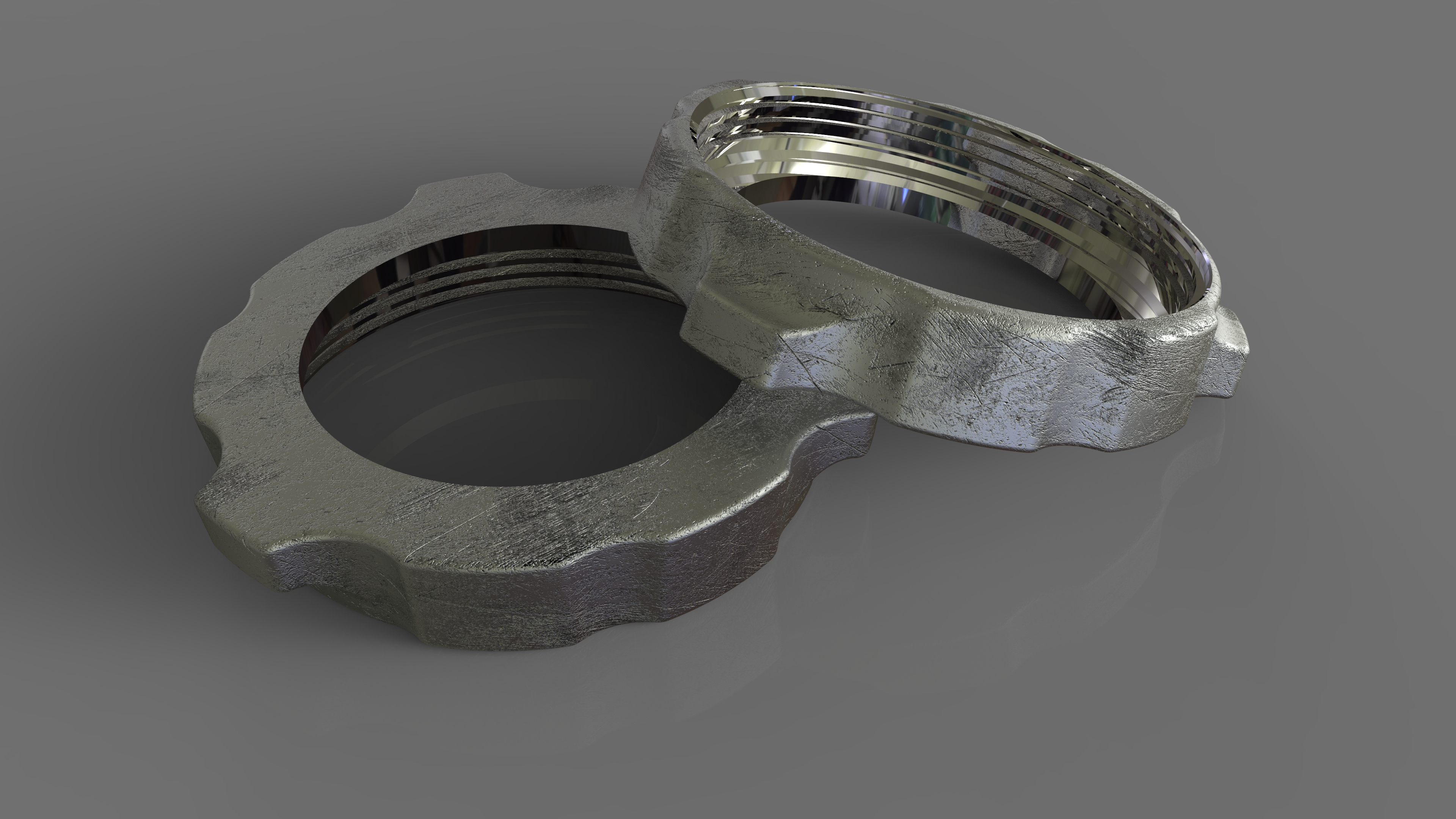 Jednoduchá strojárska súčiastka - fotorealistická vizualizácia (Creo Parametric)